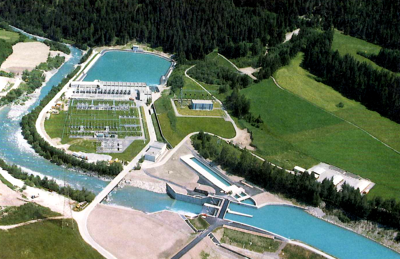 Kraftwerk Pradella in Scuol, Engadin, Schweiz